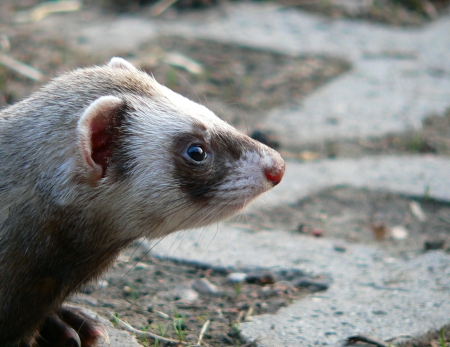 Vadászgörény